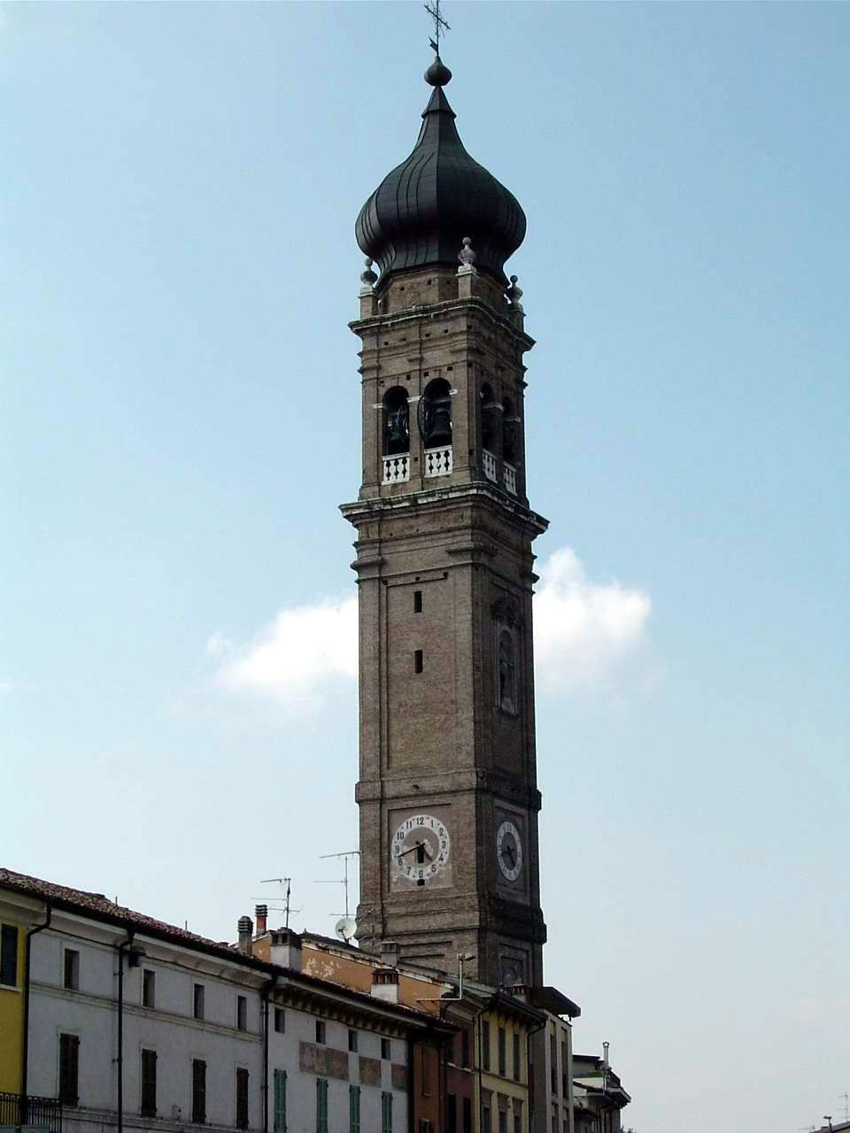 Campanile di Carpenedolo